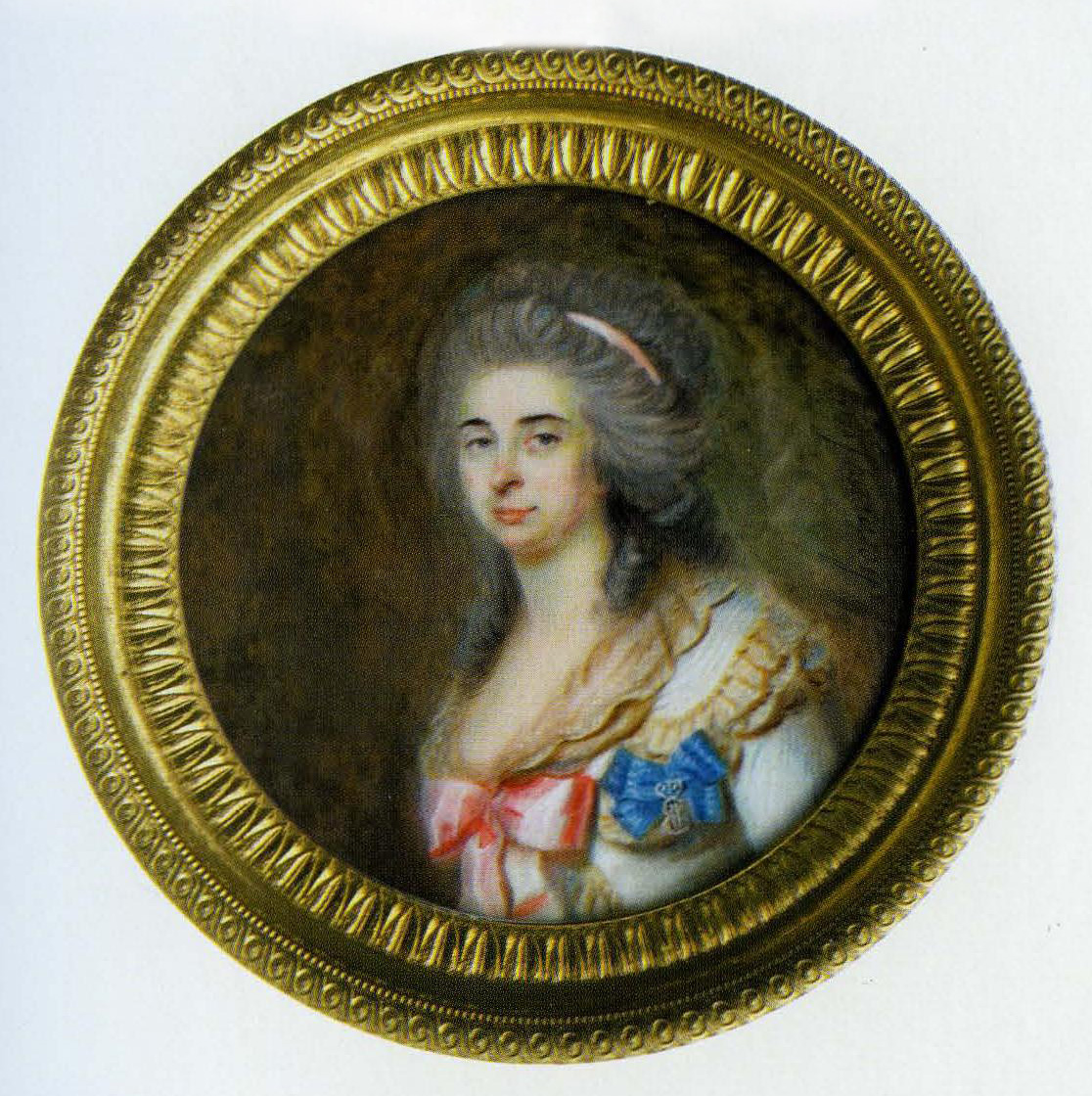 Анна Кирилловна Васильчикова (1754-1826), ур. Разумовская